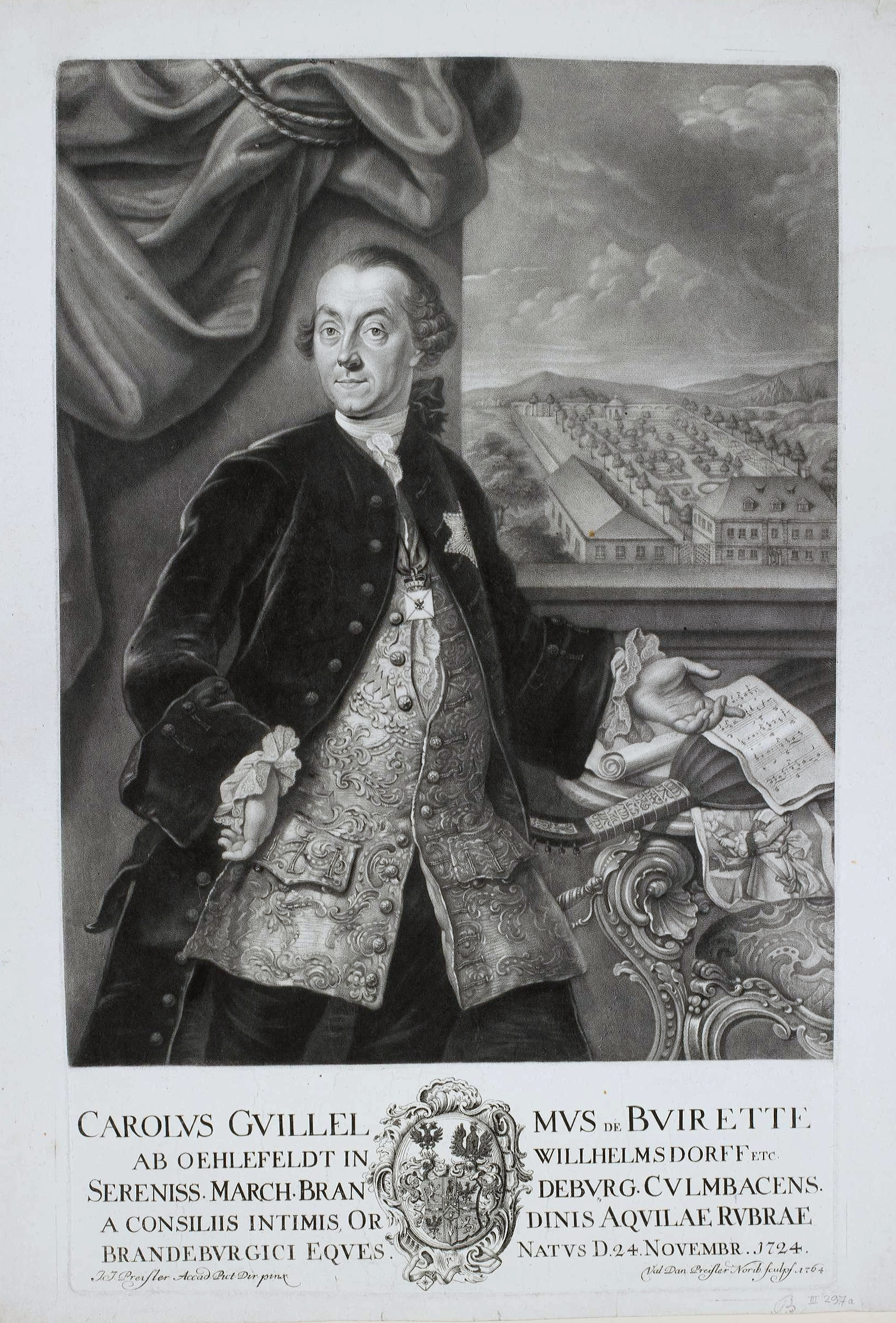 Karl Wilhelm de Buirette von Oehlefeld auf Wilhelmsdorf, (geboren 1724 – gestorben 1782). Markgräflich brandenburg-bayreuthischer Geheimer Rat und königlich preußischer Minister im Fränkischen Kreis, mit dem Großkreuz des Roten Adlerordens und seinem Familienwappen; Ansicht von Wilhelmsdorf in Mittelfranken im Hintergrund. Buirette v. Oehlefeld vermachte der Universität Erlangen 20.000 Gulden.